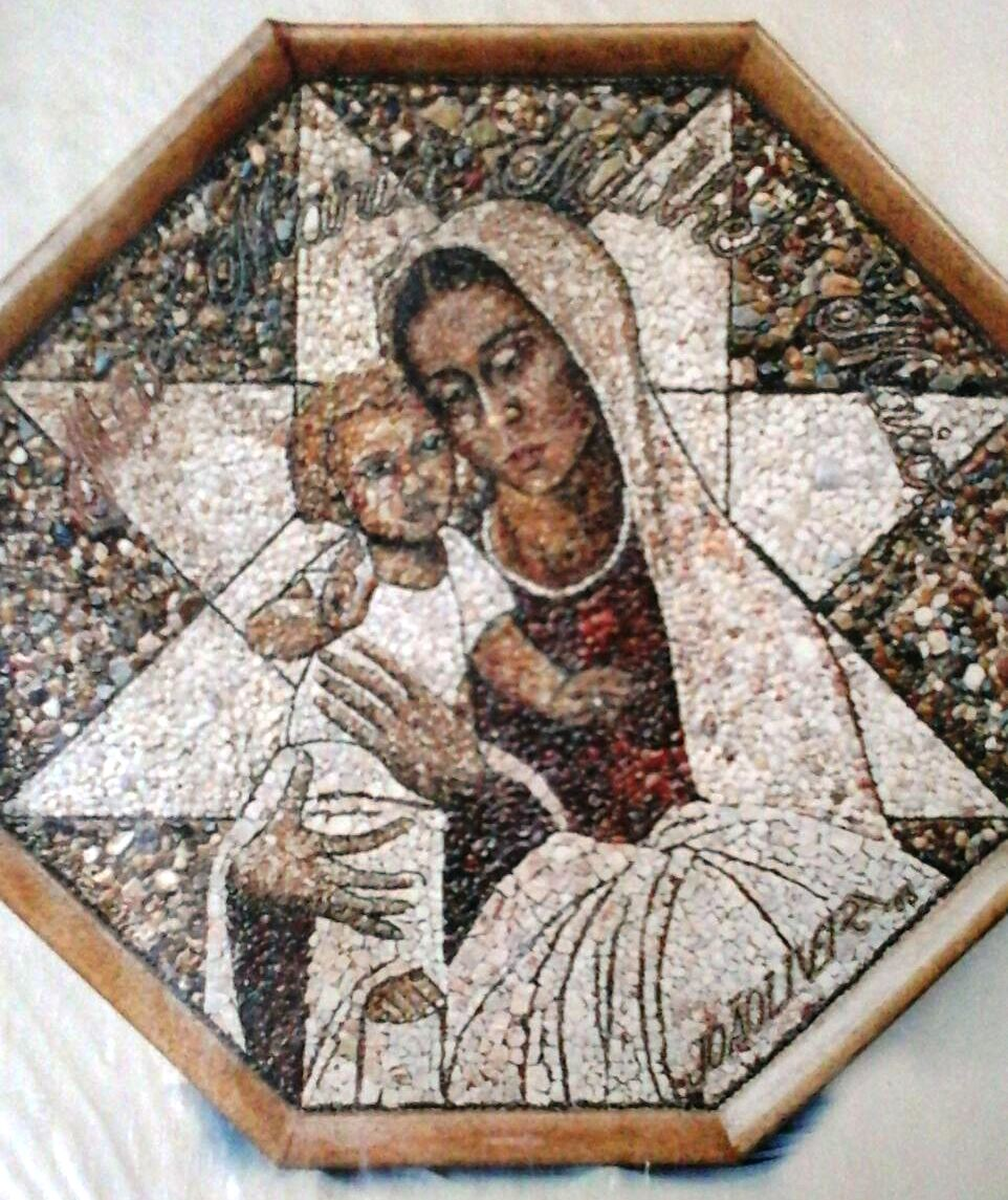 Mosaico Madona e o Menino, ano 2003, 1º lugar na exposição de Arte Santeira do Piauí no mesmo ano.